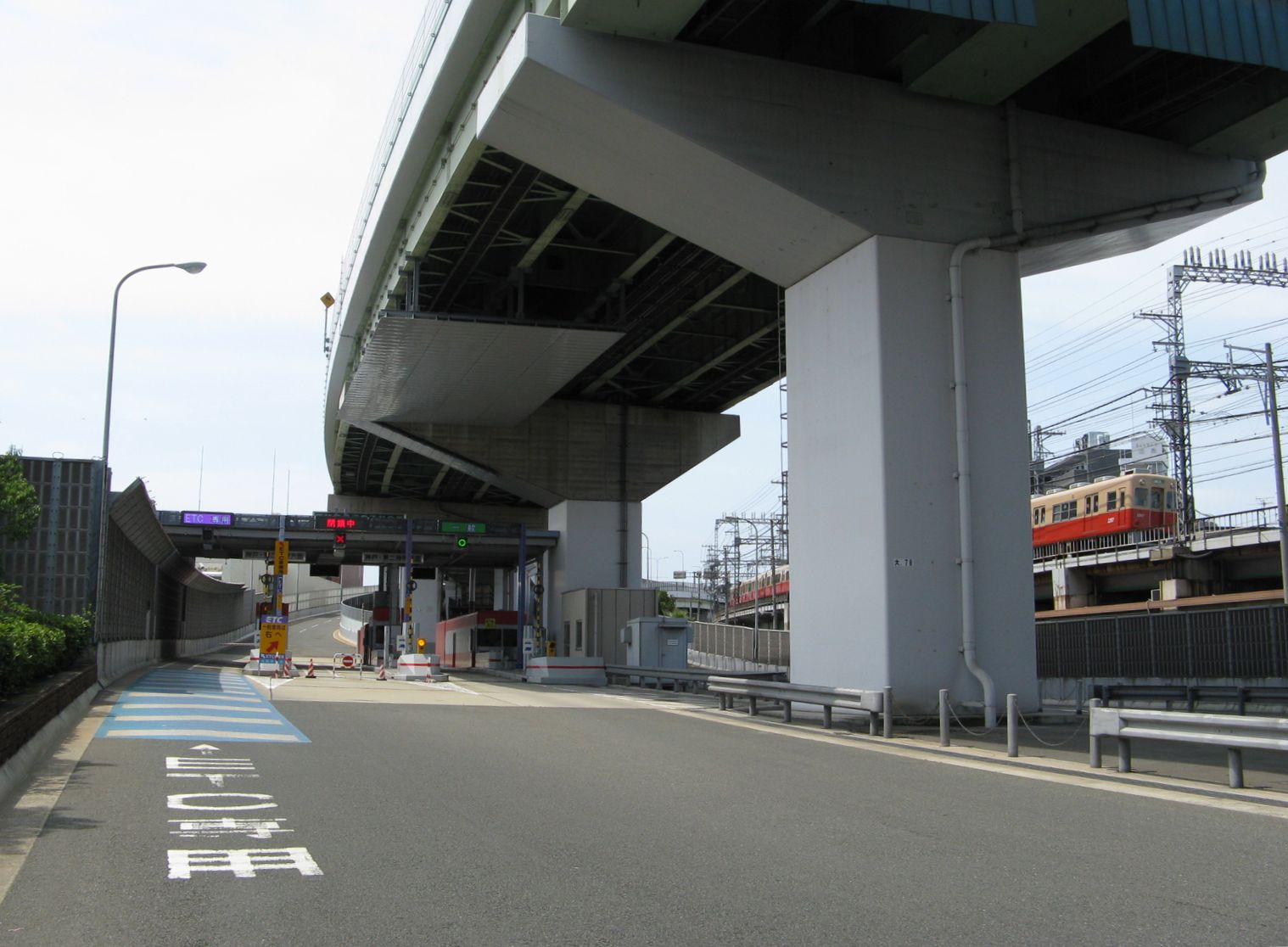 阪神高速海老江出入口 西望